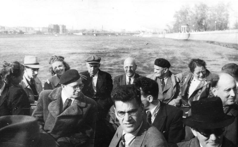 Moskau, deutsche Delegation auf Bootstour ADN-ZB Deutsche Delegation in der UDSSR; Eine Delegation der Gesellschaft zum Studium der Kultur der Sowjetunion weilte zum 1. Mai in Moskau. Anschließend besuchten die Mitglieder der Delegation verschiedene Gebiete der Sowjetunion und kehrten am 17. Mai nach Berlin zurück. U.B.z.: Mitglieder der Delegation während einer Fahrt auf der Moskwa, im Vordergrund Mitte Prof. Wolfgang Steinitz, hinterste Reihe v.r. Grete Mitkowski, Max Seydewitz und Dr. Otto Hermenau. 3388-49 Abgebildete Personen: Steinitz, Wolfgang Dr. phil.: Sprachwissenschaftler, Vizepräsident der Akademie der Wissenschaften (AdW), DDR (PND 118798626) Wittkowski, Grete Dr.: Stellvertretende Vorsitzende des Ministerrates, Präsidentin der Staatsbank, Mitglied des Zentralkomitees (ZK) der SED, DDR (PND 106202952) Seydewitz, Max: Ministerpräsident von Sachsen, DDR (PND 11861360X)